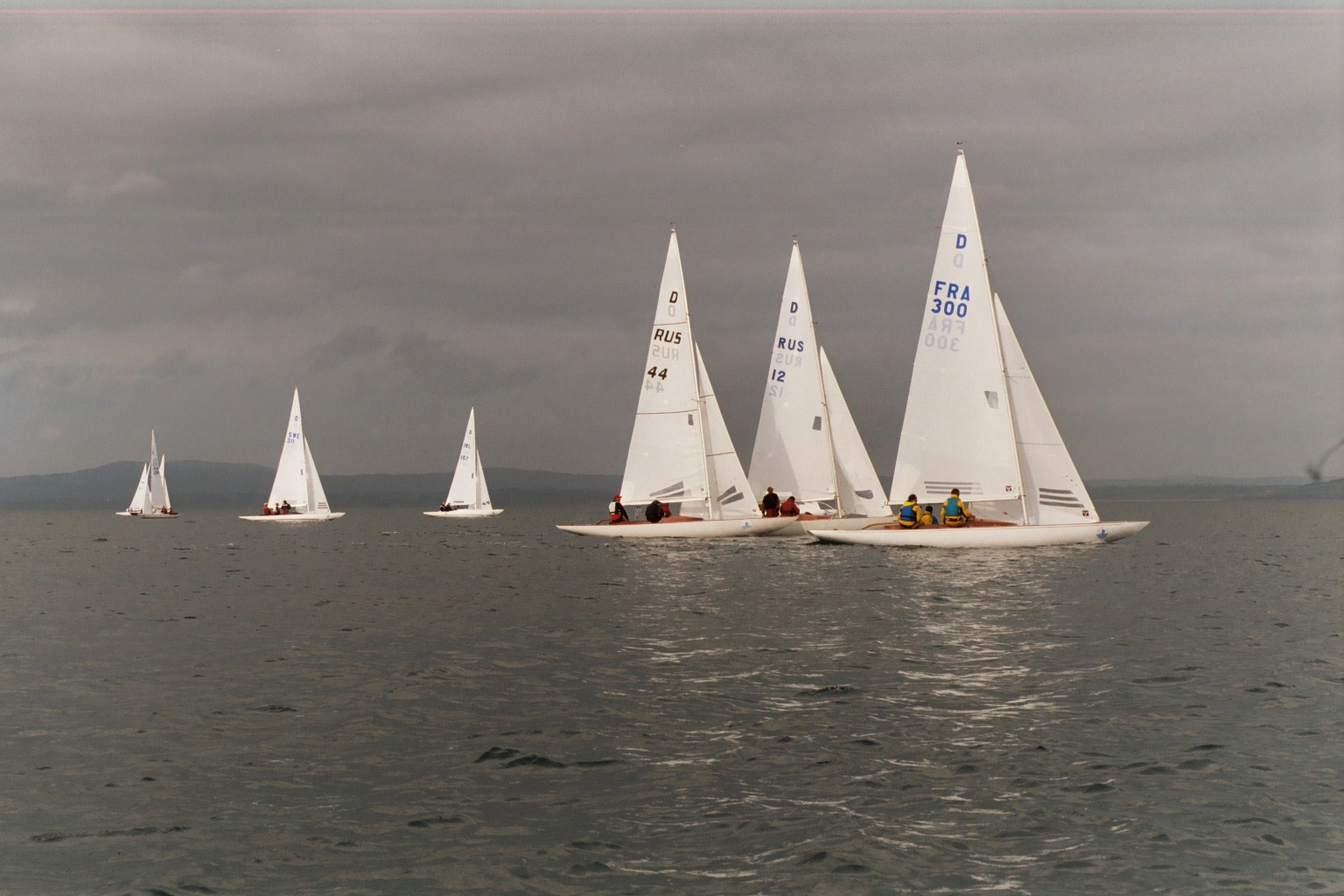 Dragons en régate (Grand Prix Petit Navire, Douarnenez mai 2005) je suis l'auteur du fichier. Licence GNU FDL --Silvi 5 janvier 2006 à 10:45 (CET)